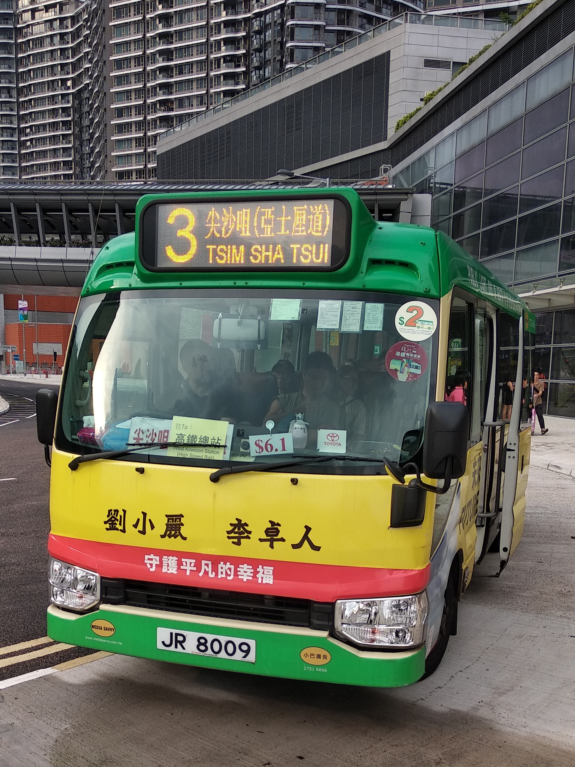 中文（香港）: 駛入柯士甸站B4出入口外的小巴站的九龍區專線小巴3號線西九龍站特別班。